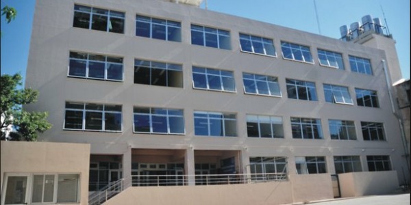 Fachada principal de la sede Constitucion inaugurada, vista desde la plaza seca de la facultad.